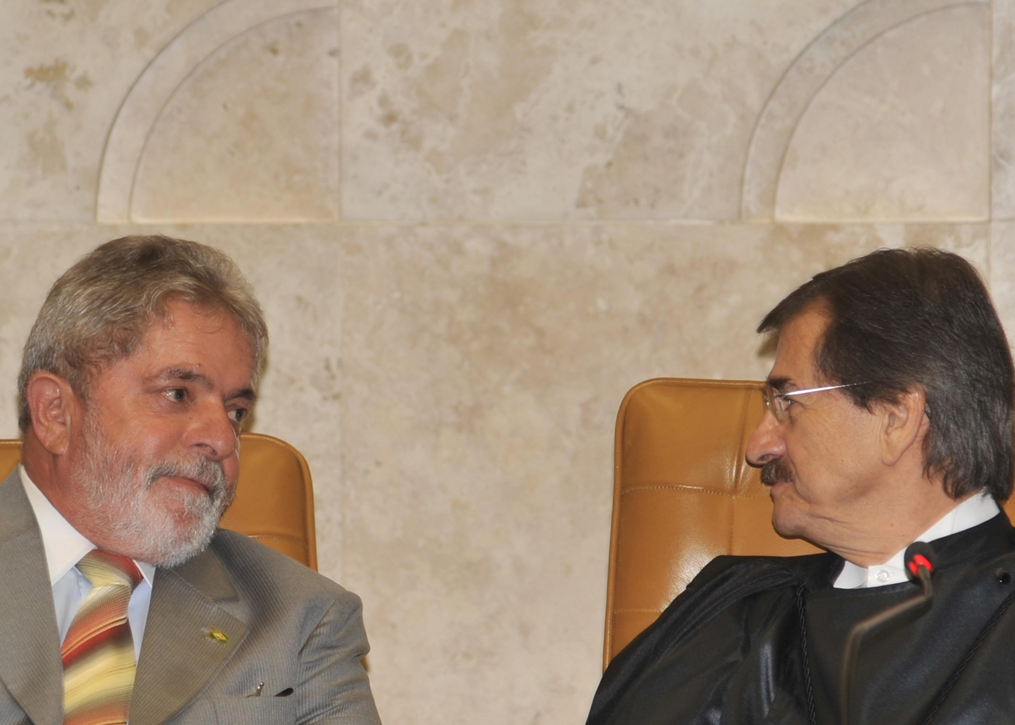 Brasília - Presidente Lula cumprimenta o novo presidente do Supremo Tribunal Federal (STF), ministro Cezar Peluso, durante cerimônia de posse (José Cruz/ABr)